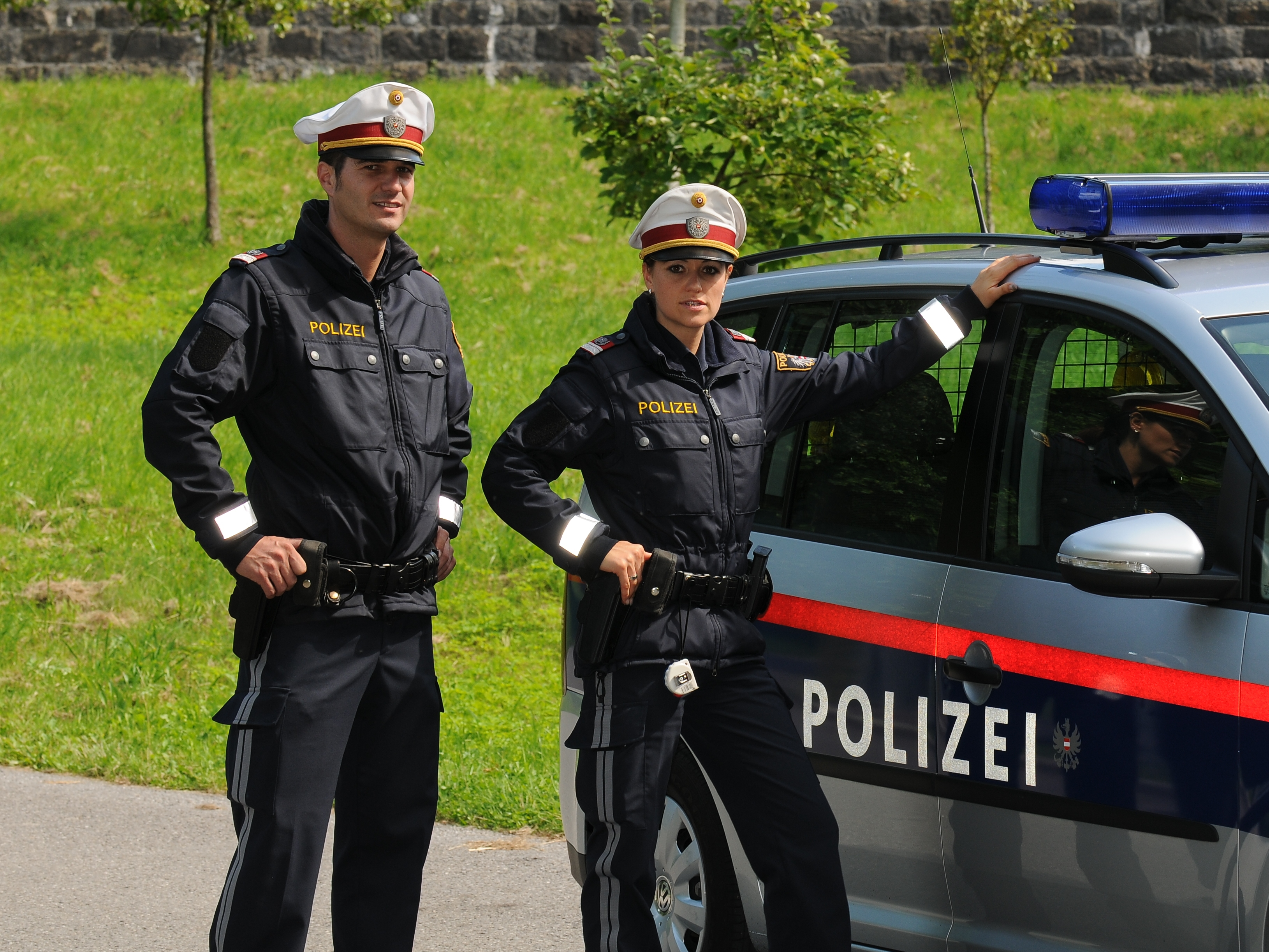 Zwei Beamte der österreichischen Bundespolizei.